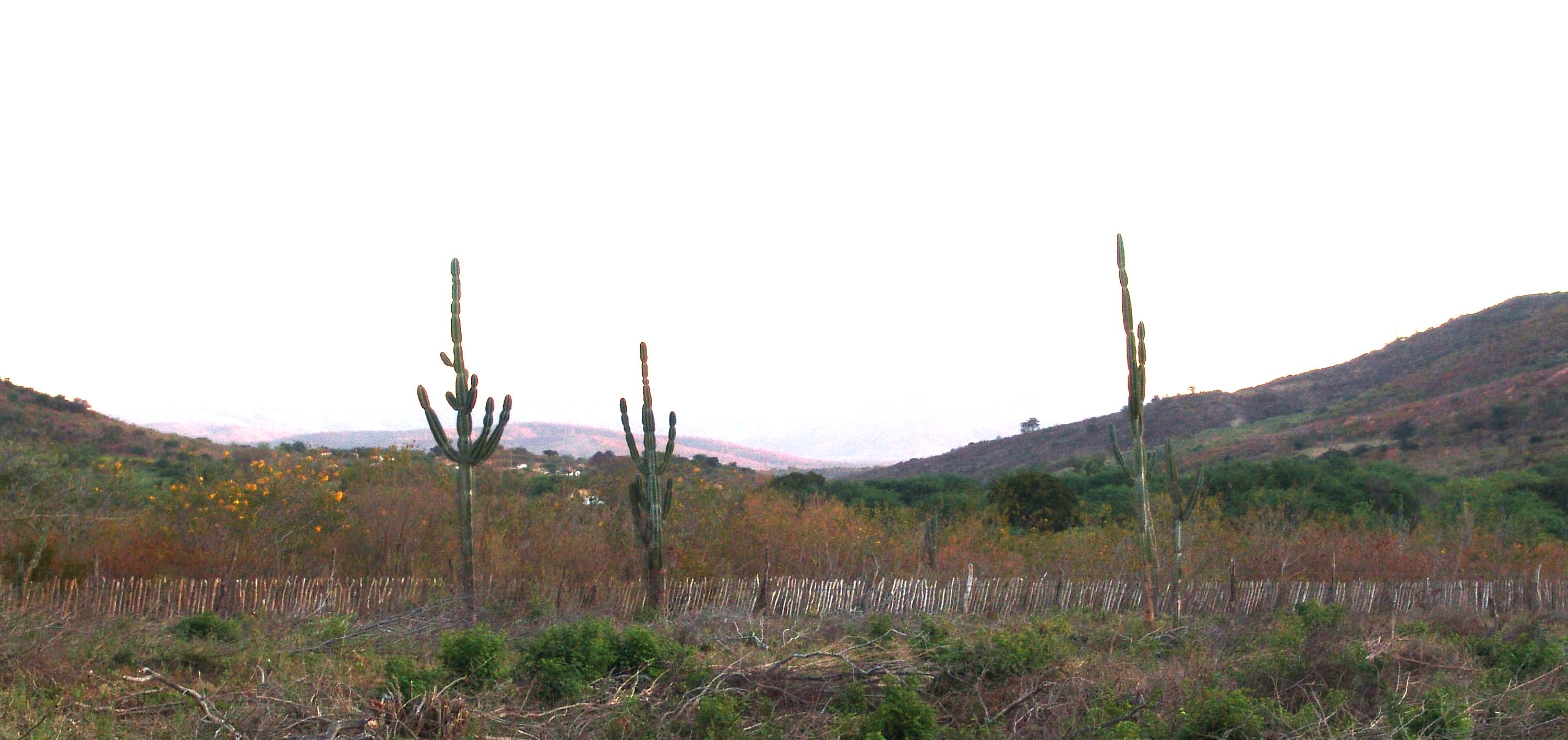 Foto da caatinga na Fazenda Casa dos Carneiros